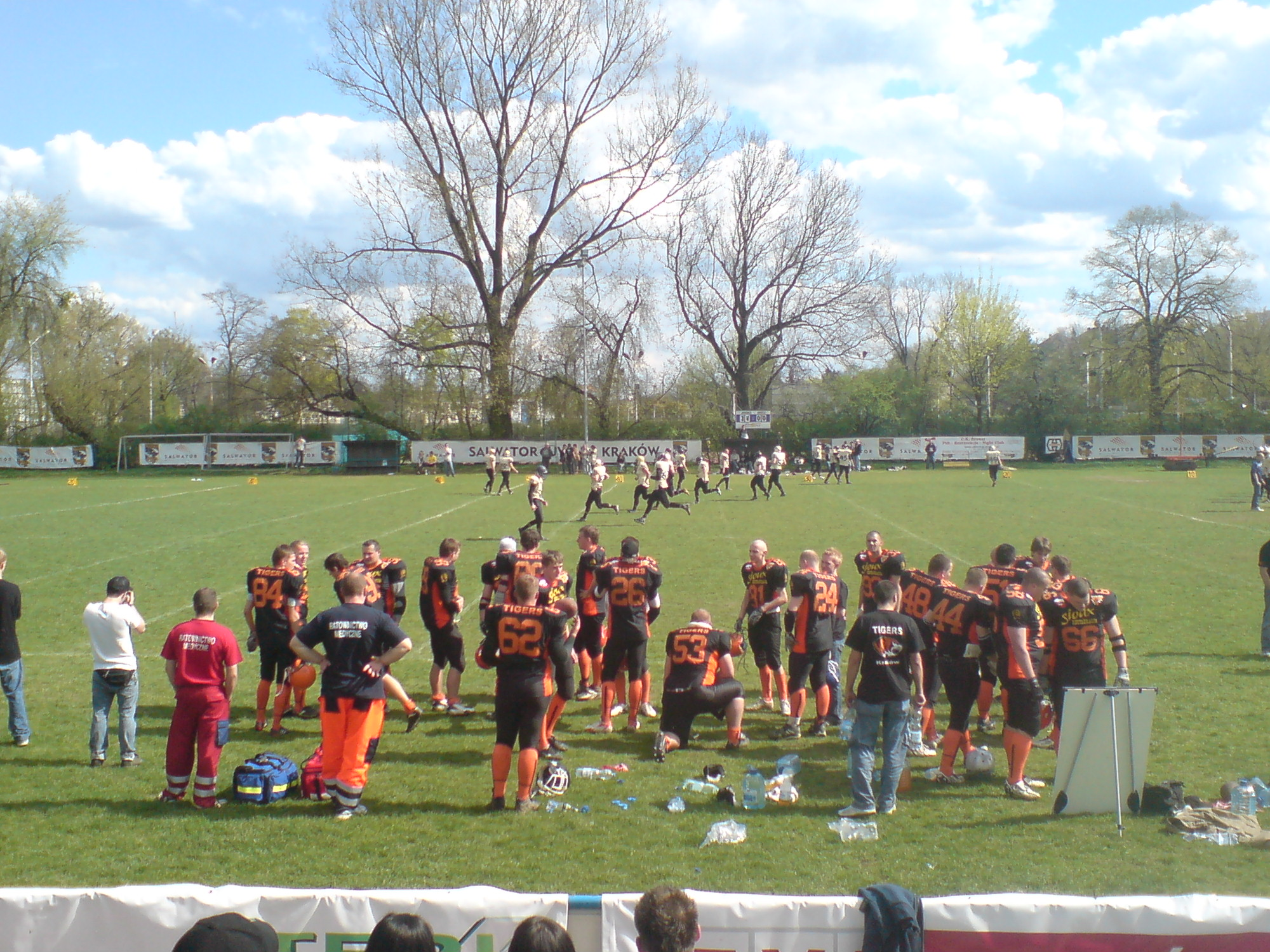 Kraków Tigers - drużyna futbolu amerykańskiego w przerwie meczu II ligi ze Scyzorami Kielce